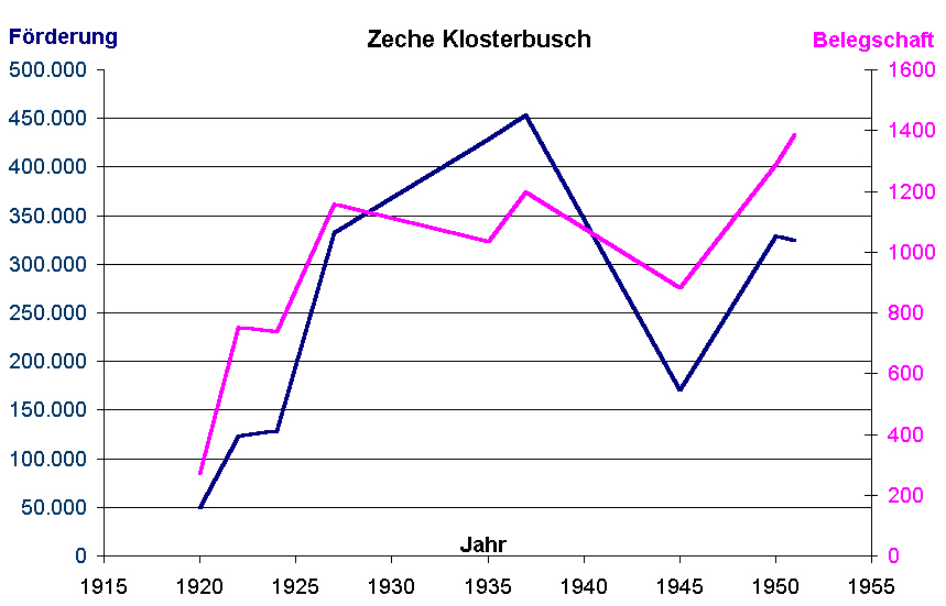 Schluffschichtung in Schräglage der Zeche Klosterbusch